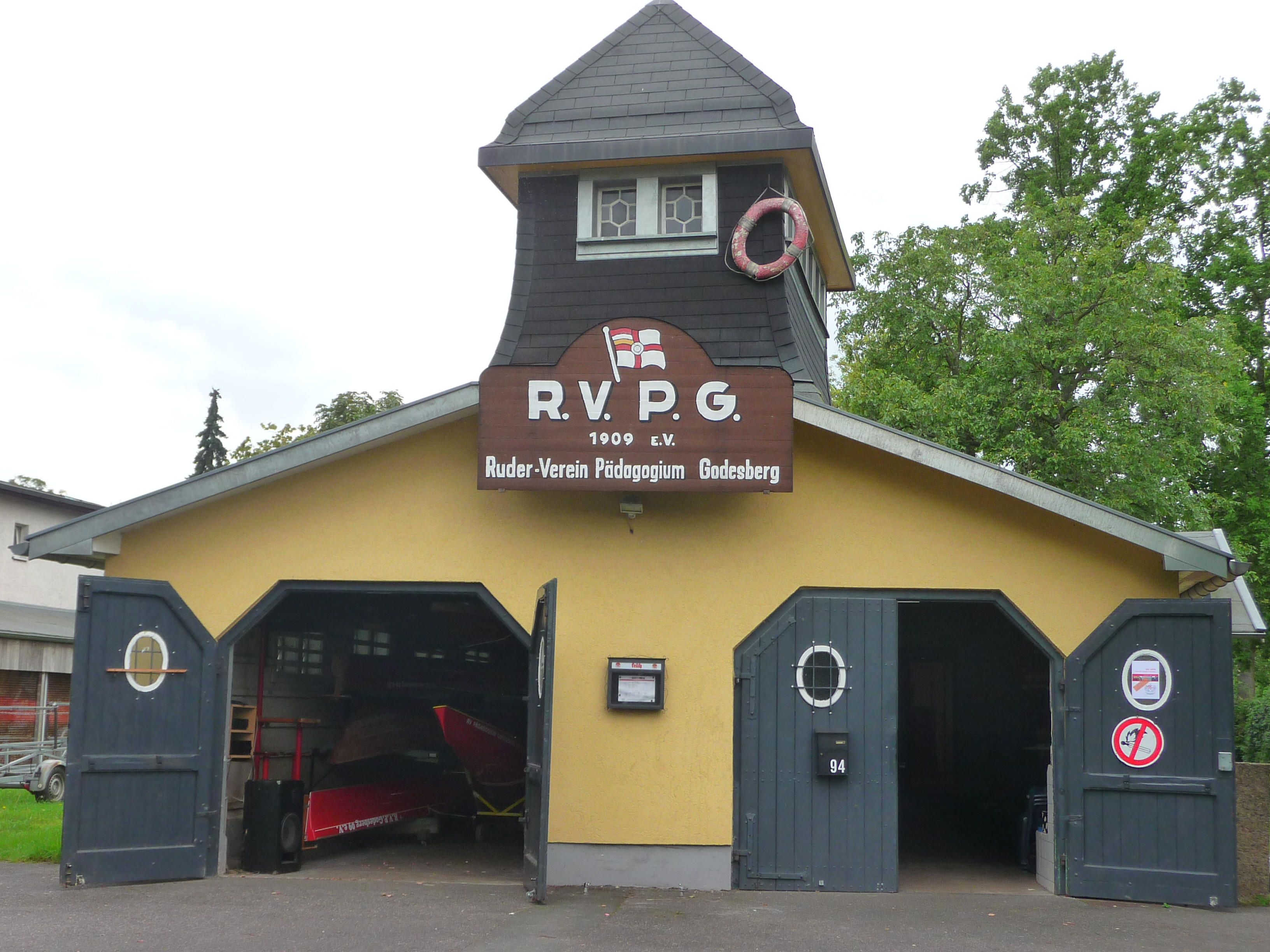 Ruderverein Pädagogium Godesberg, Rheinstraße 94, Bonn-Rüngsdorf